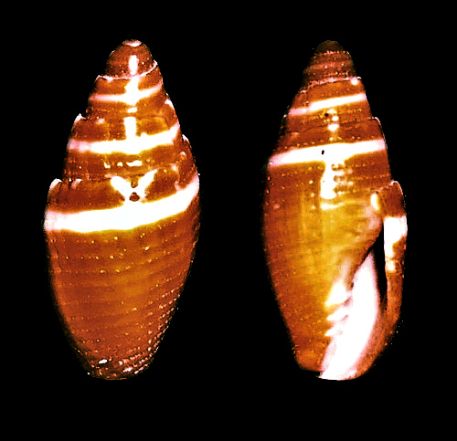 Mitra (Nebularia) coronata; Mindanao, Philippines